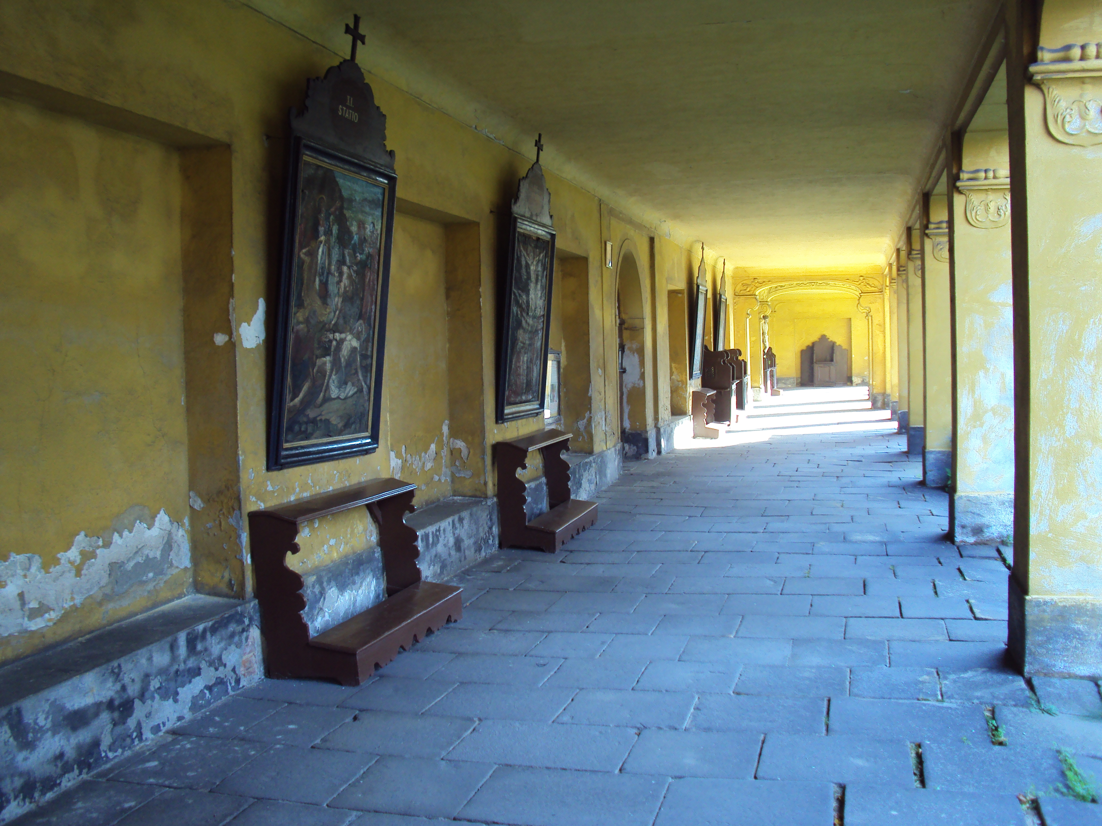 Z ambitu farního kostela v Horní Polici